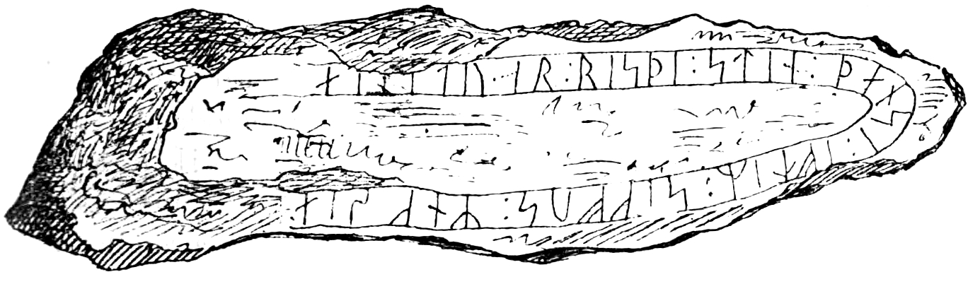 Runstenen Ög 219 på Lundby gärde i Lillkyrka socken, Östergötland. Teckning i "Utdrag af Antiqvitets-Intendenten P. A. Säves afgifna berättelse för år 1861", publicerad i Antiqvarisk tidskrift för Sverige band 1, 1864.